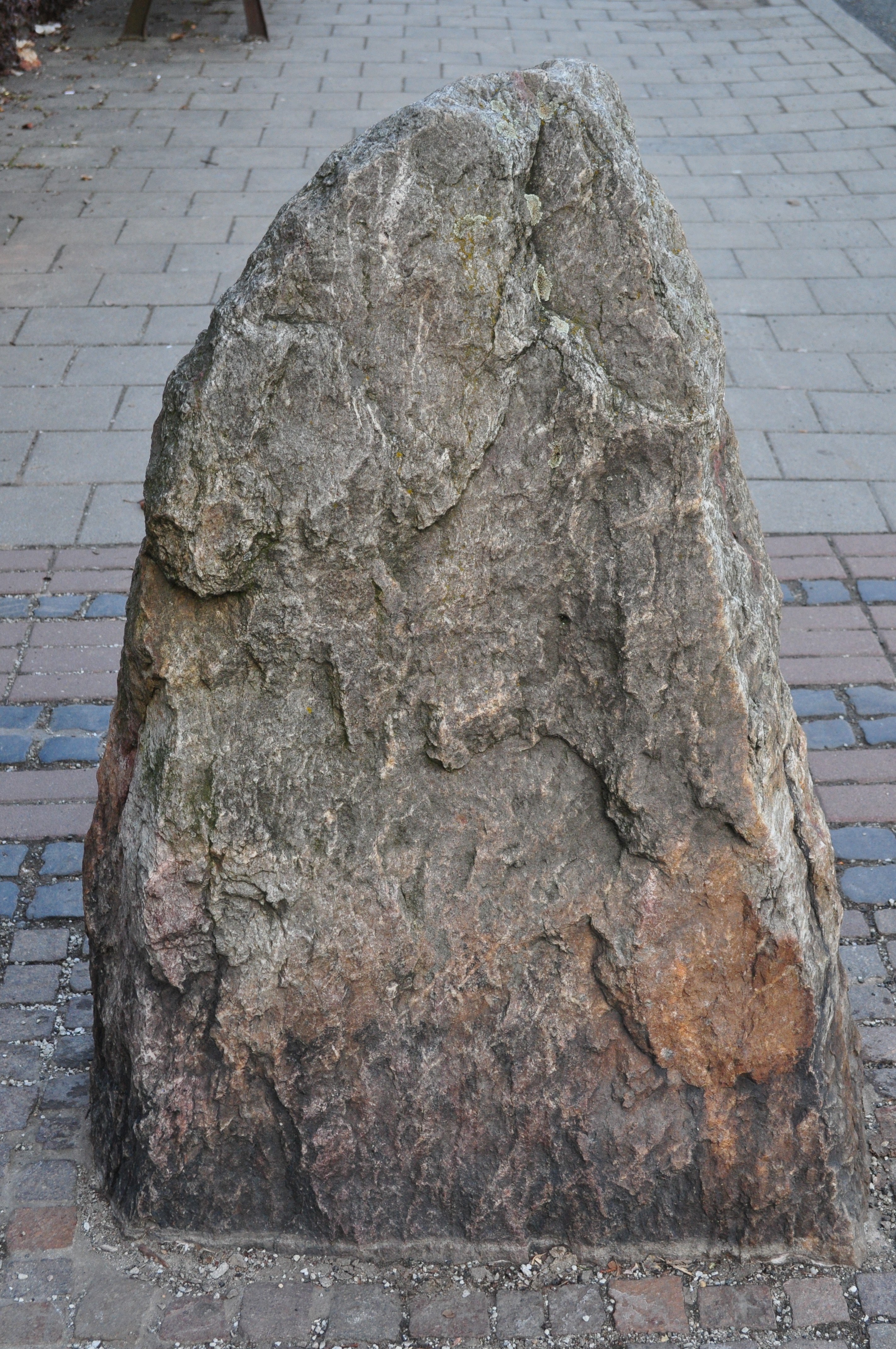 Gluckenstein in Kirdorf